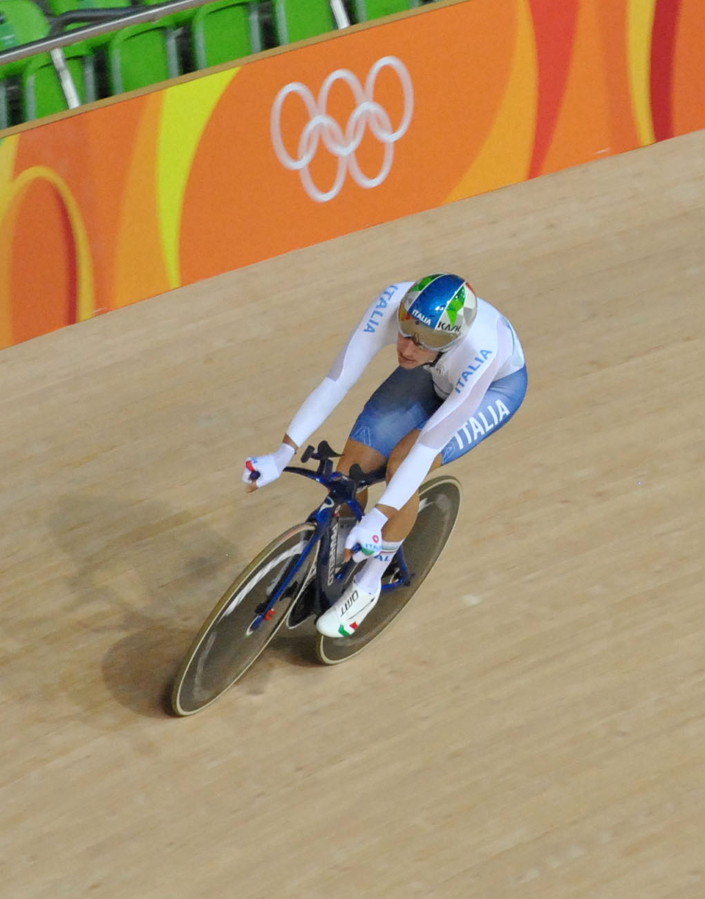 Ciclismo de pista. Men's Omnium. Rio Olympic Velodrome. Rio 2016. Elia Viviani.